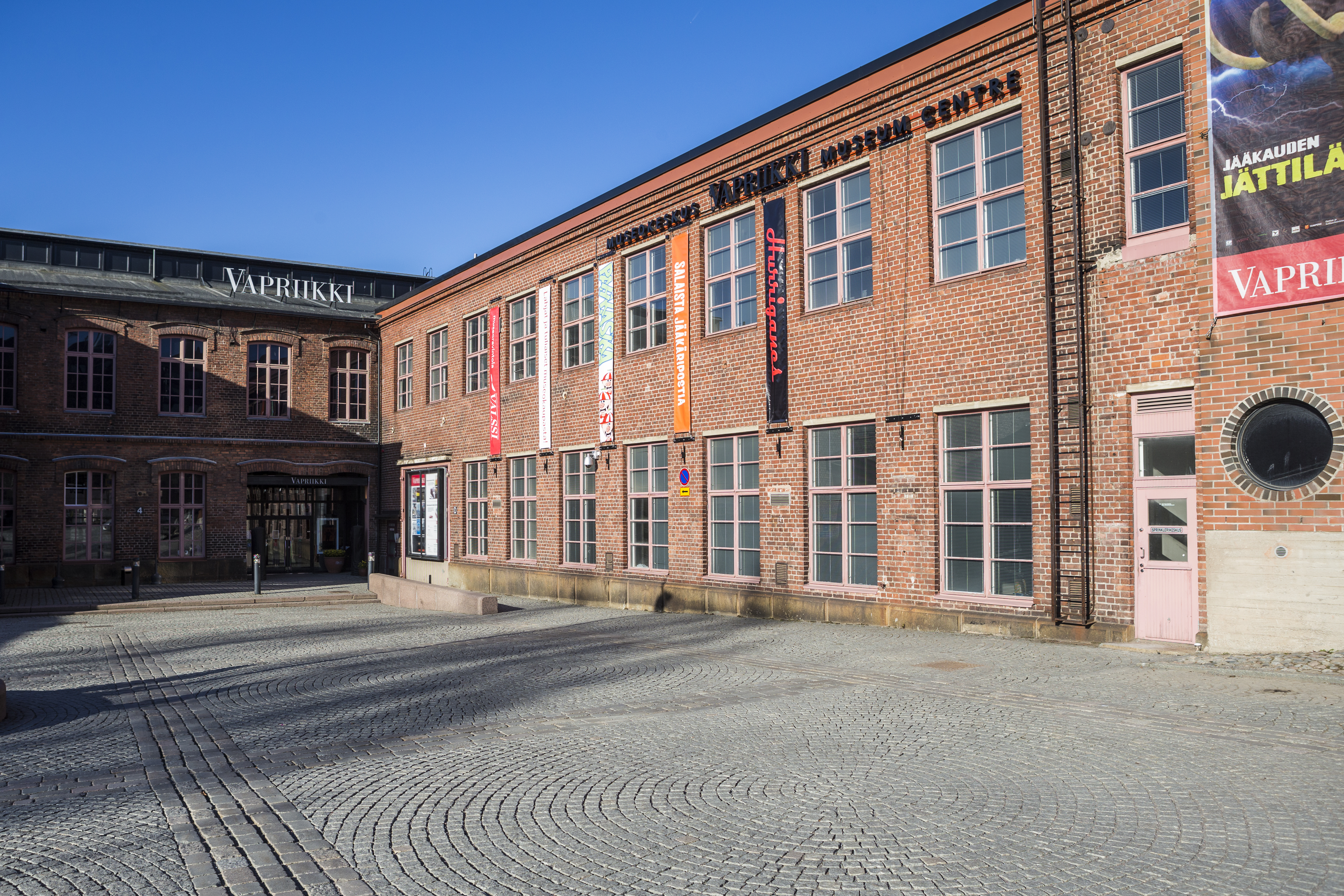 Museum Center Vapriikki